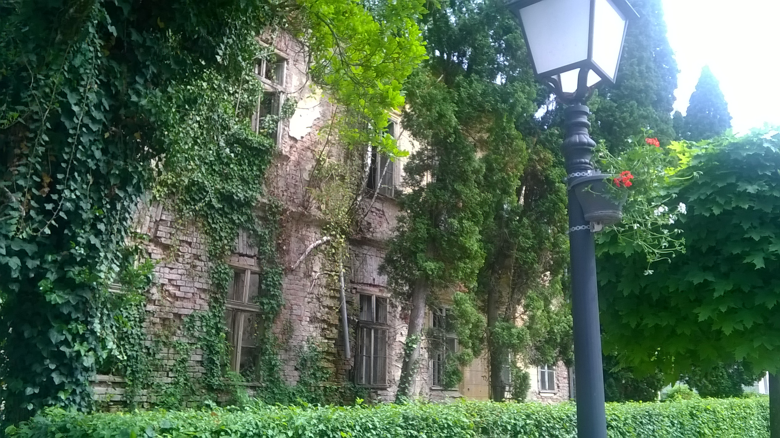 Lipik